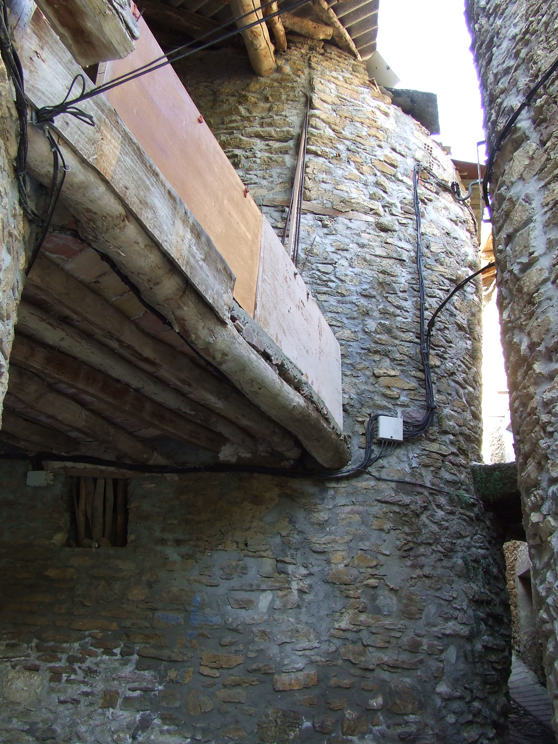 Restes d'una torre del mur que cloïa Paüls de Flamisell (Mont-ros, la Torre de Cabdella, Pallars Jussà)